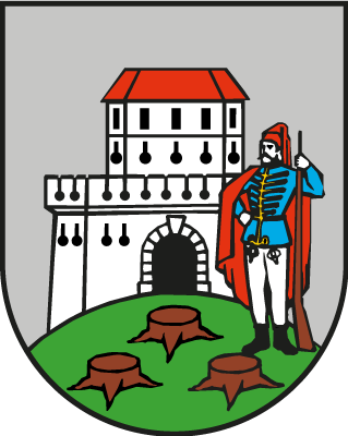 Grb Grada Bjelovara